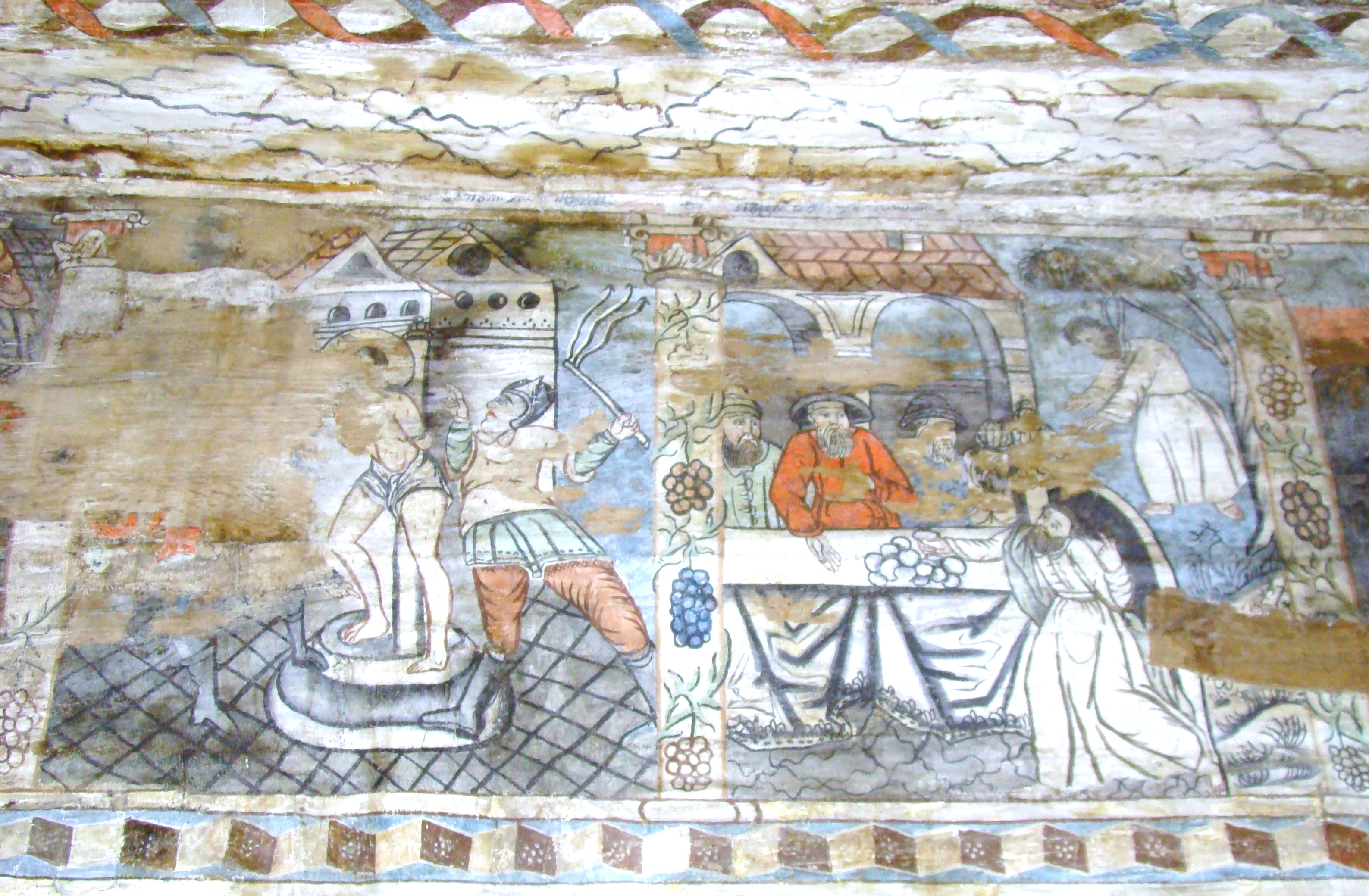 Biserica de lemn "Intrarea Maicii Domnului în Biserică" , sat BÂRSANA